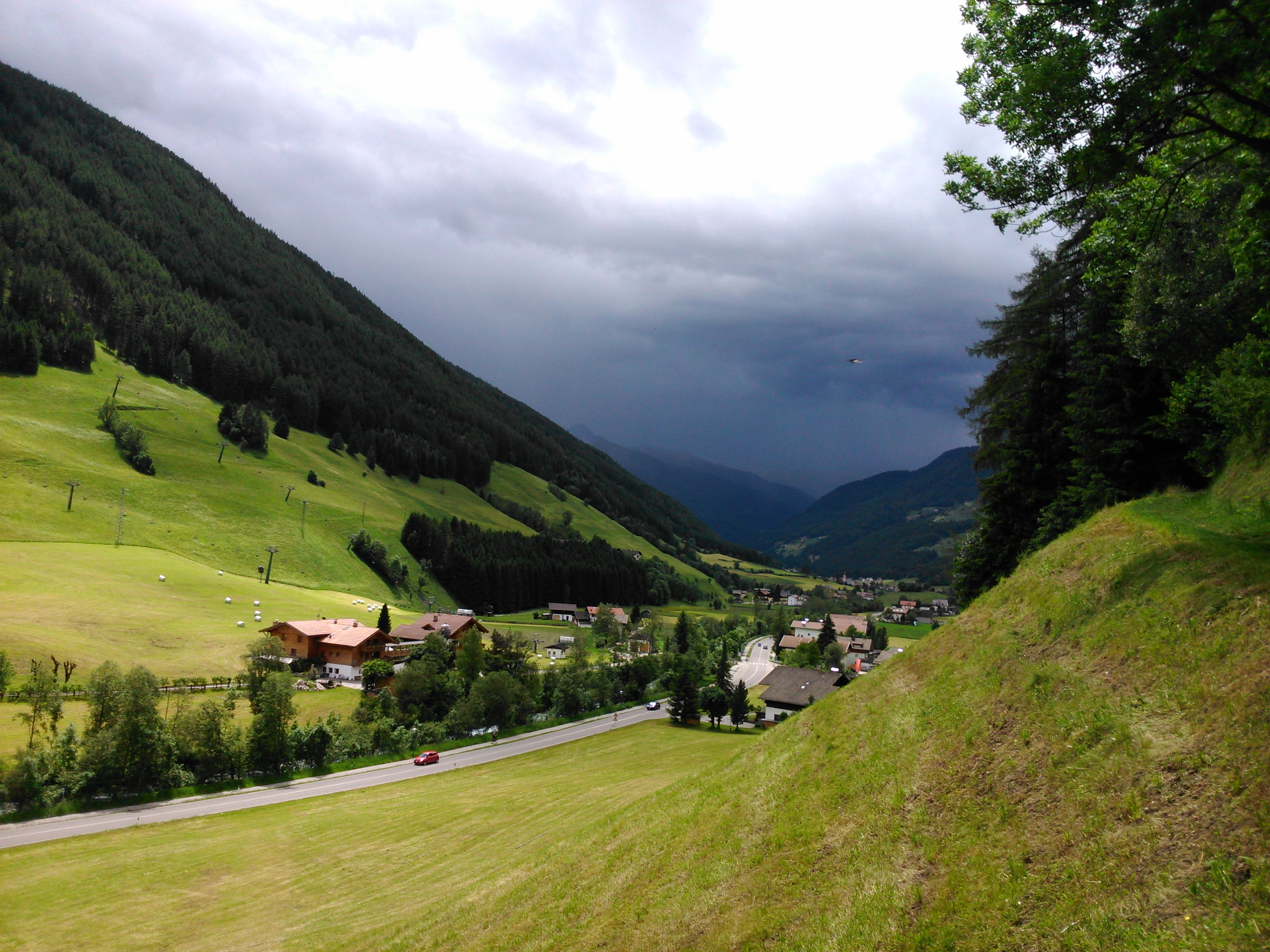 brewing storm